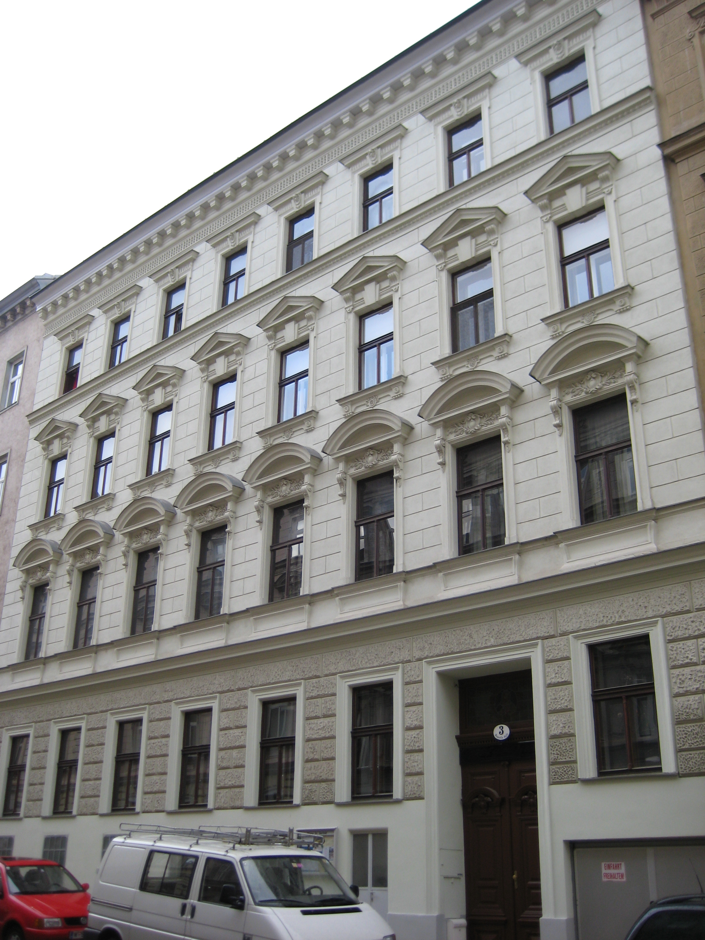 Pfarrhaus St. Gertrud